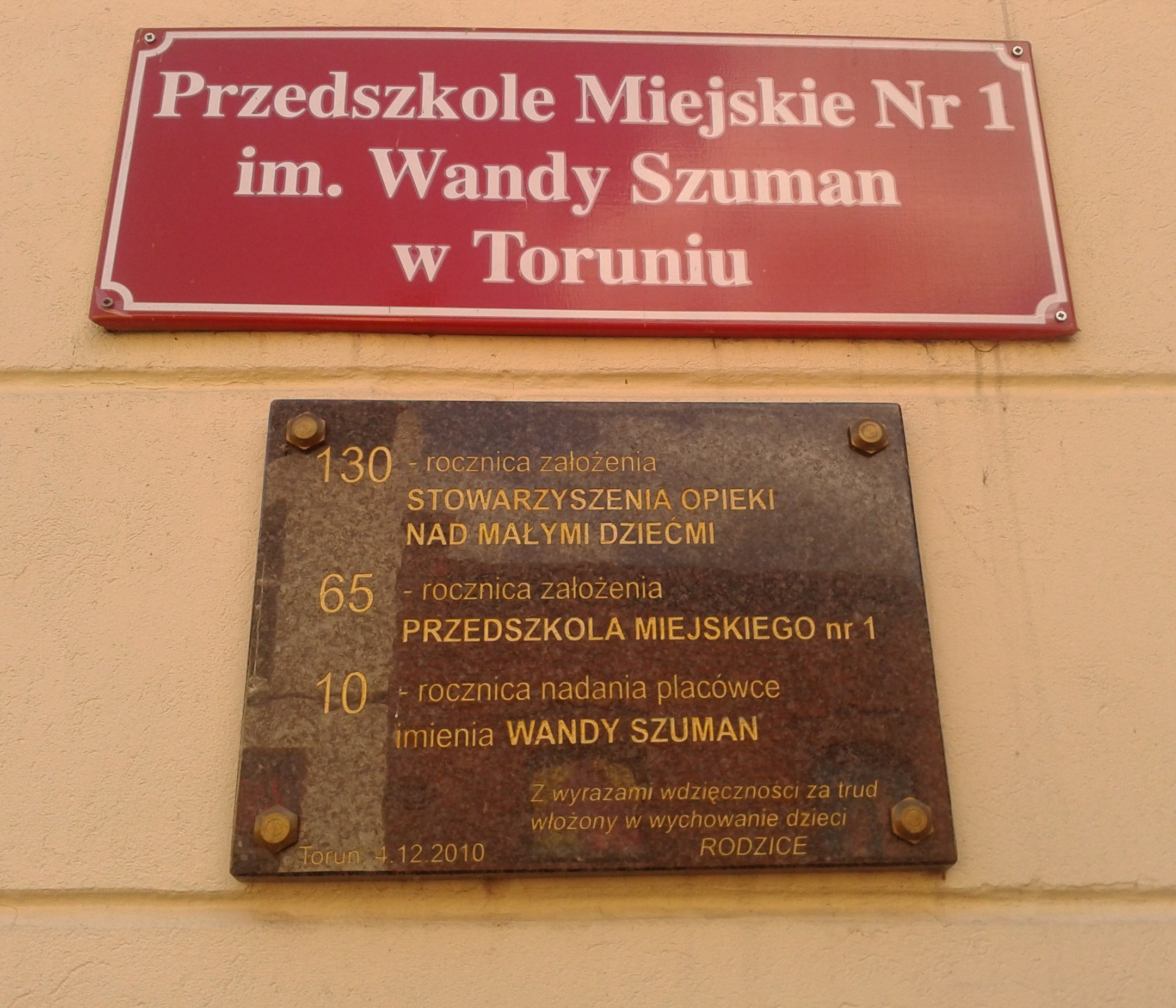 Tablice informacyjna i pamiątkowa Przedszkola Miejskiego Nr 1 imienia Wandy Szuman w Toruniu (oficjalna strona przedszkola) - ulica Strumykowa 13 tablica informacyjna: Przedszkole Miejskie nr 1 w Toruniu/ imienia Wandy Szuman w Toruniu tablica pamiątkowa: 130 - rocznica założenia/STOWARZYSZENIA OPIEKI/ NAD MAŁYMI DZIEĆMI/ 65 - rocznica założenia/PRZEDSZKOLA MIEJSKIEGO nr 1/ 10 - rocznica nadania placówce/ imienia WANDY SZUMAN z wyrazami wdzięczności za trud/ włożony w wychowanie dzieci/RODZICE Toruń/4.12.2010